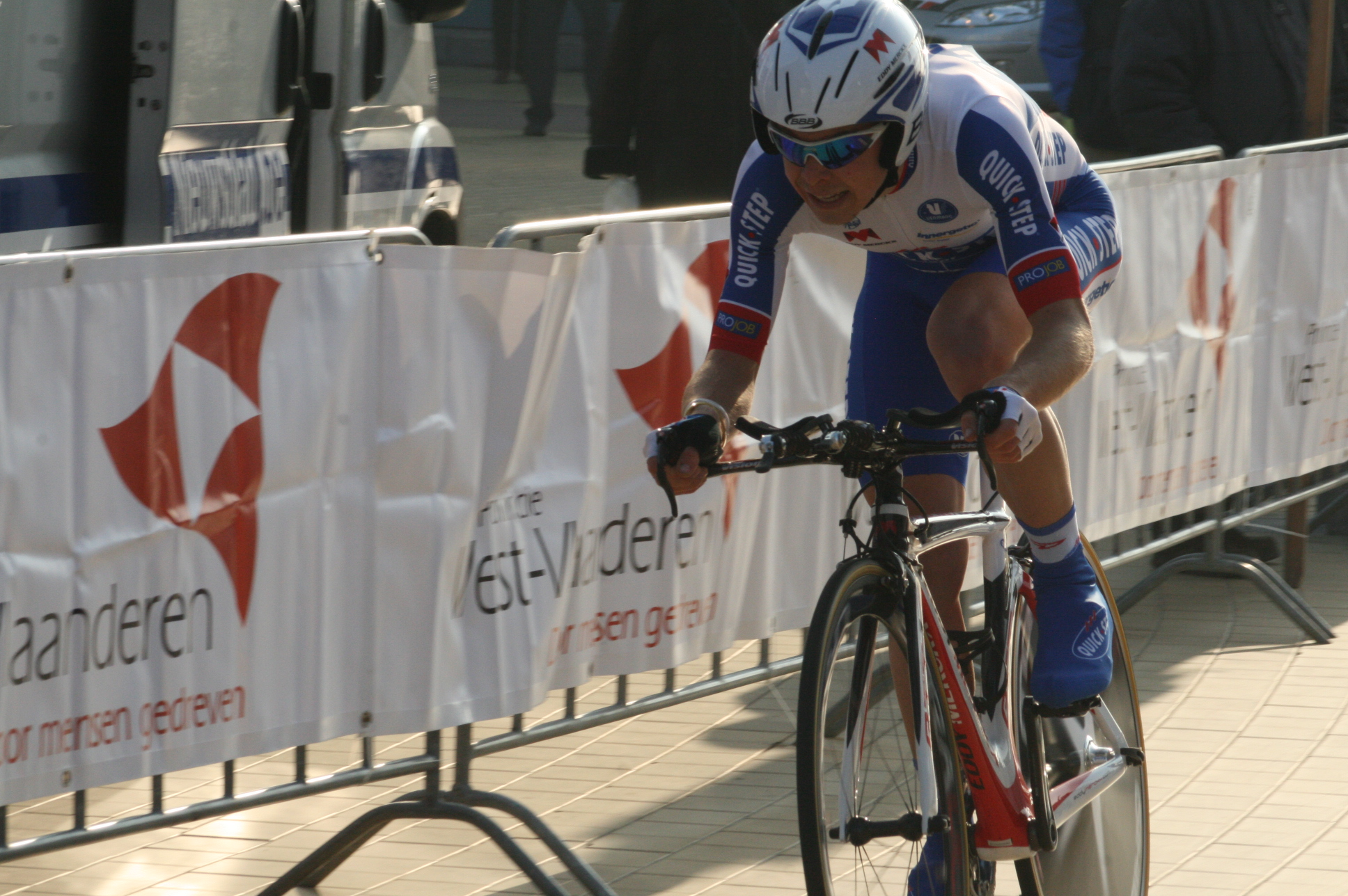 Driedaagse van West-Vlaanderen 2011, proloog in Middelkerke